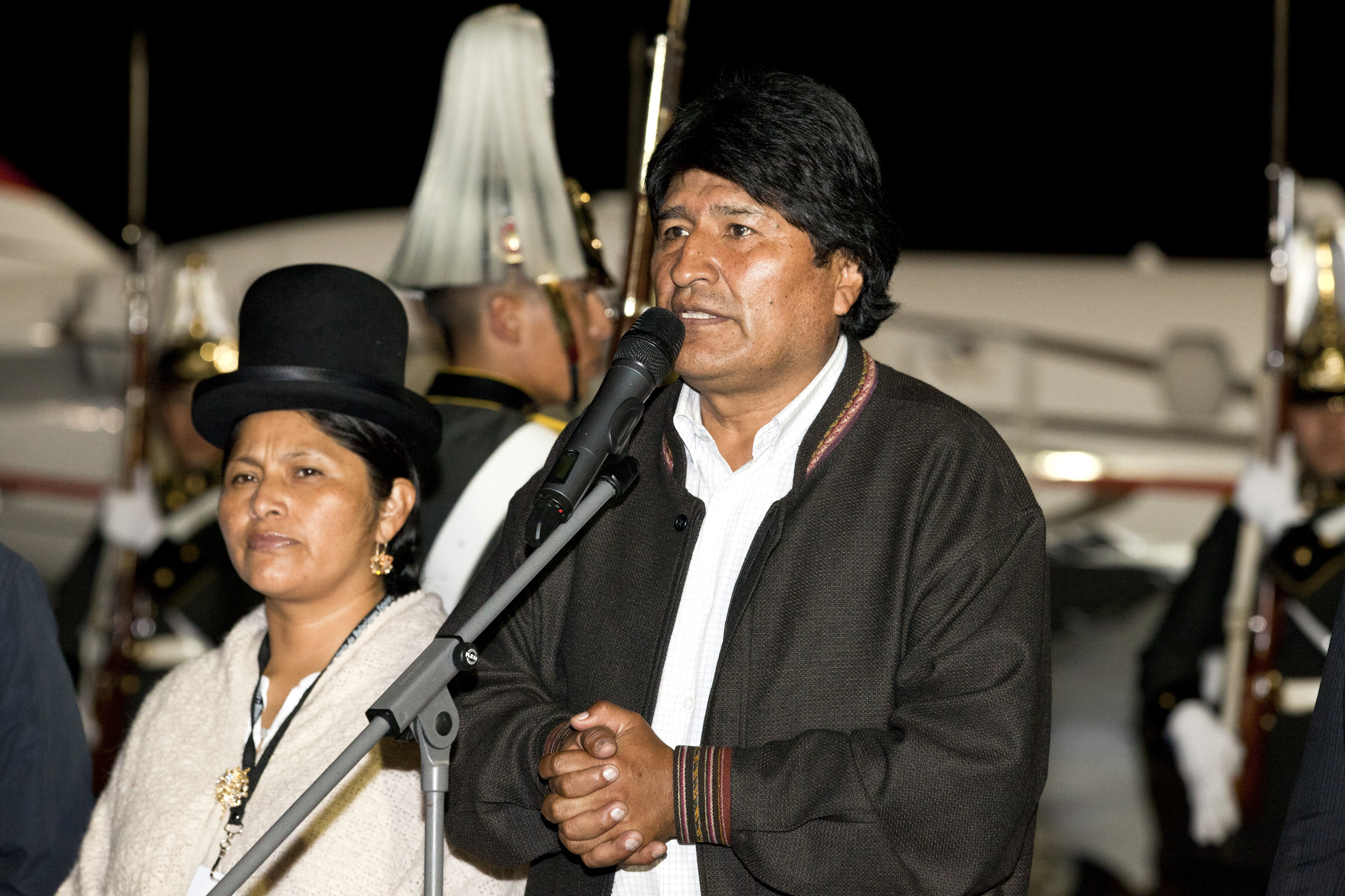 Quito (Ecuador), 22 de Julio 2013. Cerca de las 21h30 arribó al aeropuerto Mariscal Sucre de Quito, el Presidente del Estado Plurinacional de Bolivia, Evo Morales, junto a su Canciller David Choquehuanca. El Ministro de Relaciones Exteriores y Movilidad Humana, Ricardo Patiño dio la bienvenida al mandatario boliviano junto a la Embajadora de Bolivia en Ecuador, Ruzena Maribel Santamaría. Foto: Fernanda LeMarie - Cancillería del Ecuador.